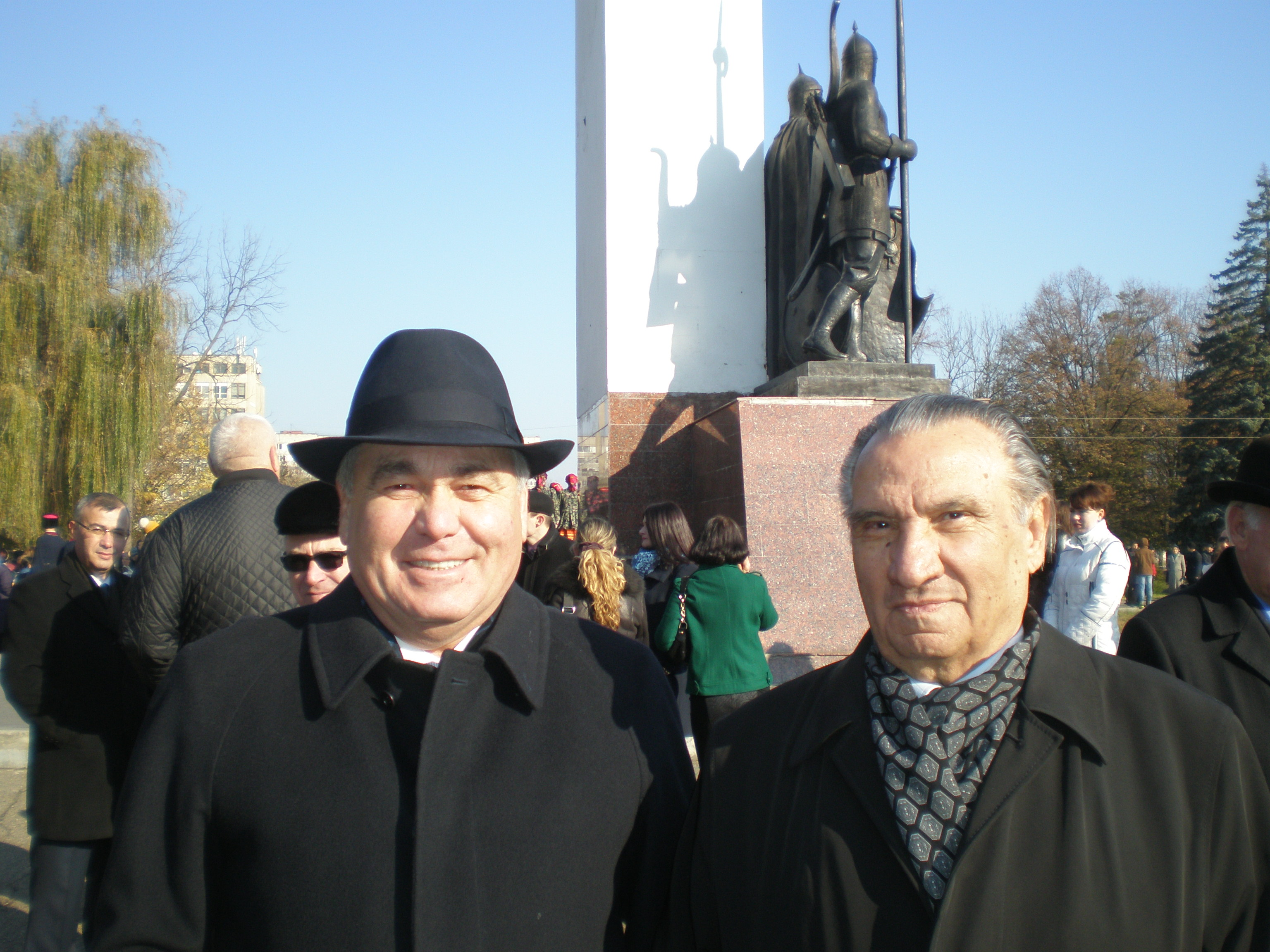 Р. Хунагов и И. Машбаш у памятника Навеки с Россией. 4.11.2014 Майкоп.